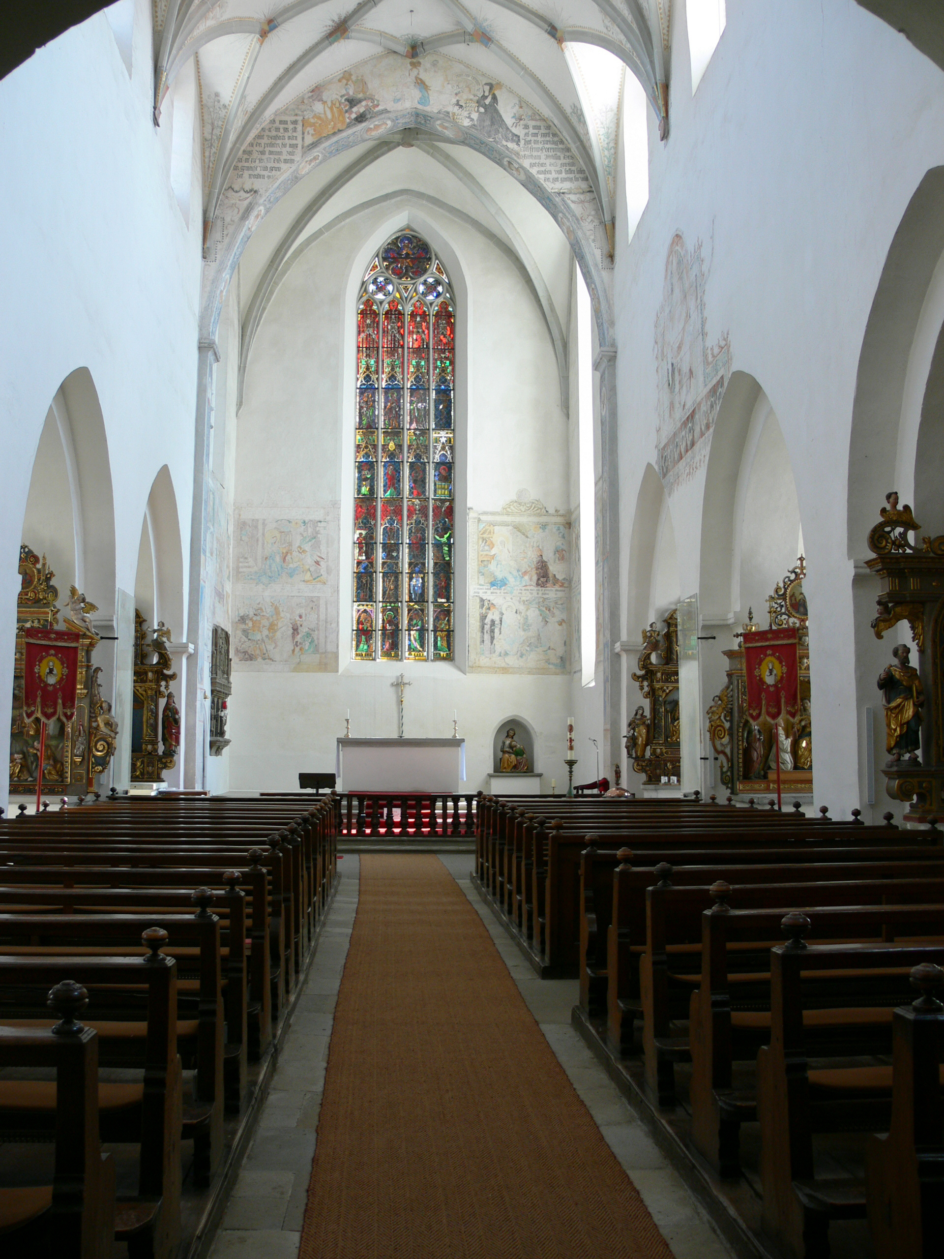 Kloster Heiligkreuztal Münster St. Anna Hauptschiff und Chor